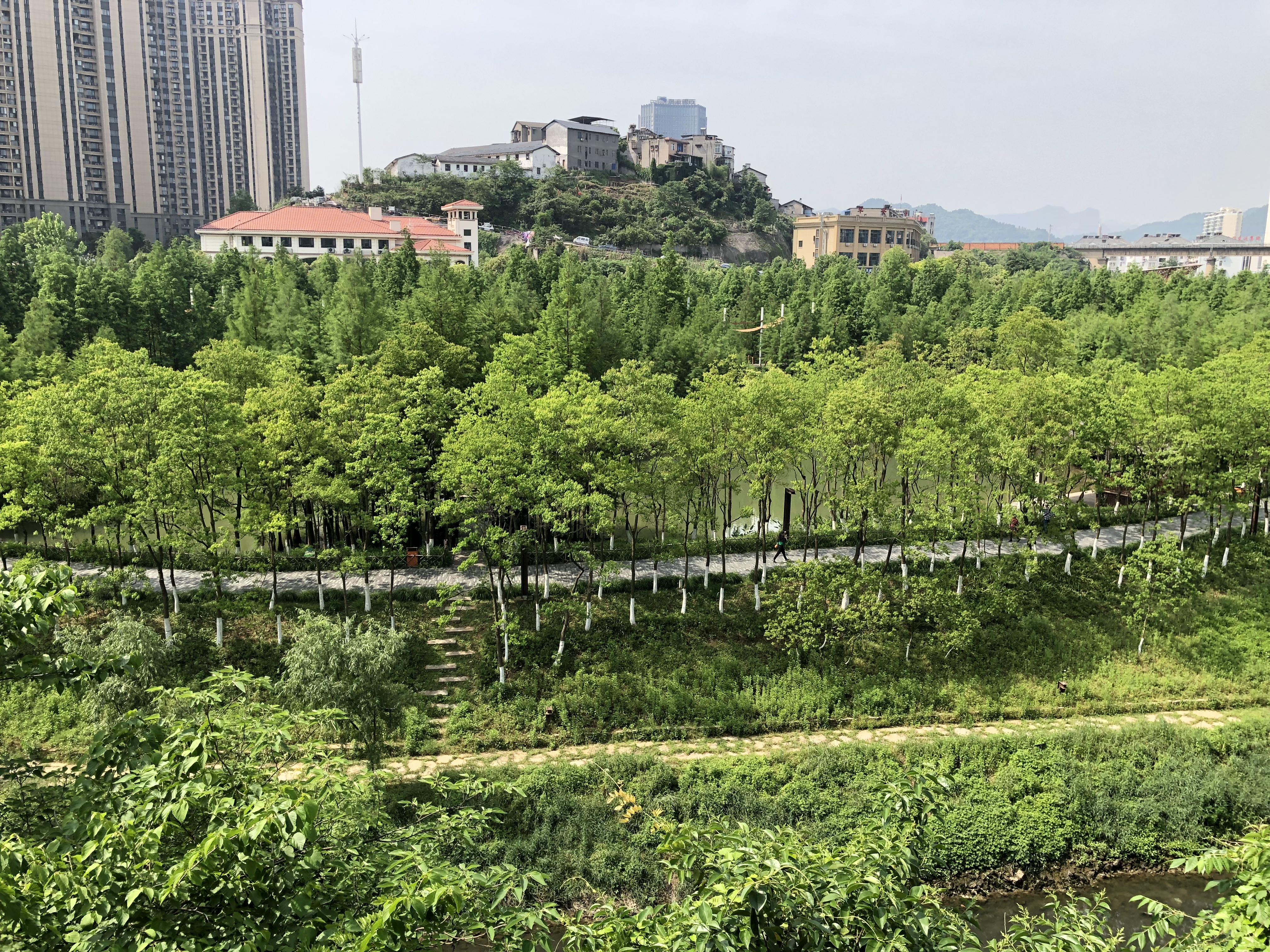 中文（中国大陆）: 湖北省宜昌市西陵区港窑路11号附近的运河公园